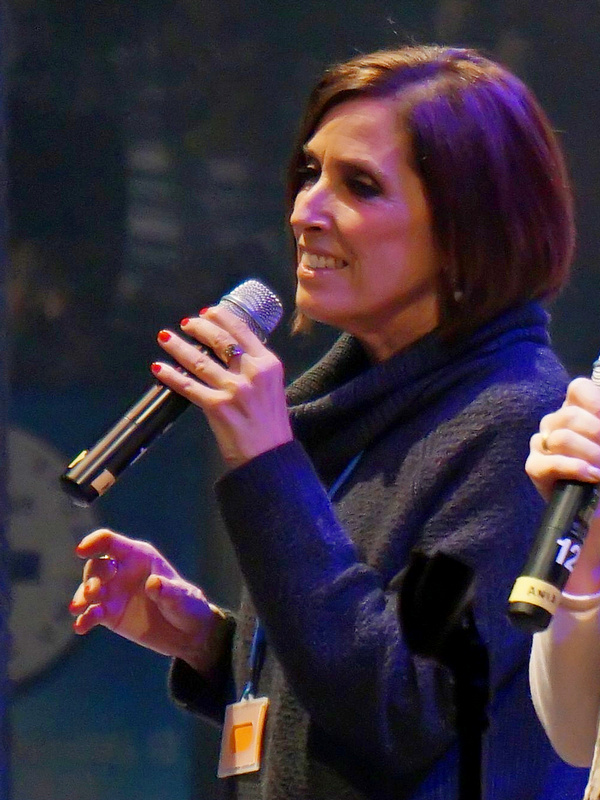 Maria Vadia – amerykańska charyzmatyczka, autorka książek religijnych. Sesja formacyjna "Uwielbienie uwalnia serce!", Hala Sportowa MOSiR w Łodzi, 7-8 lutego 2015.